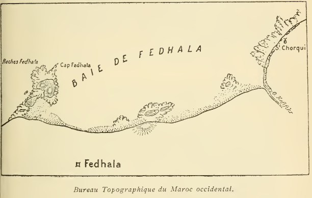 Carte Baie de Fedhala